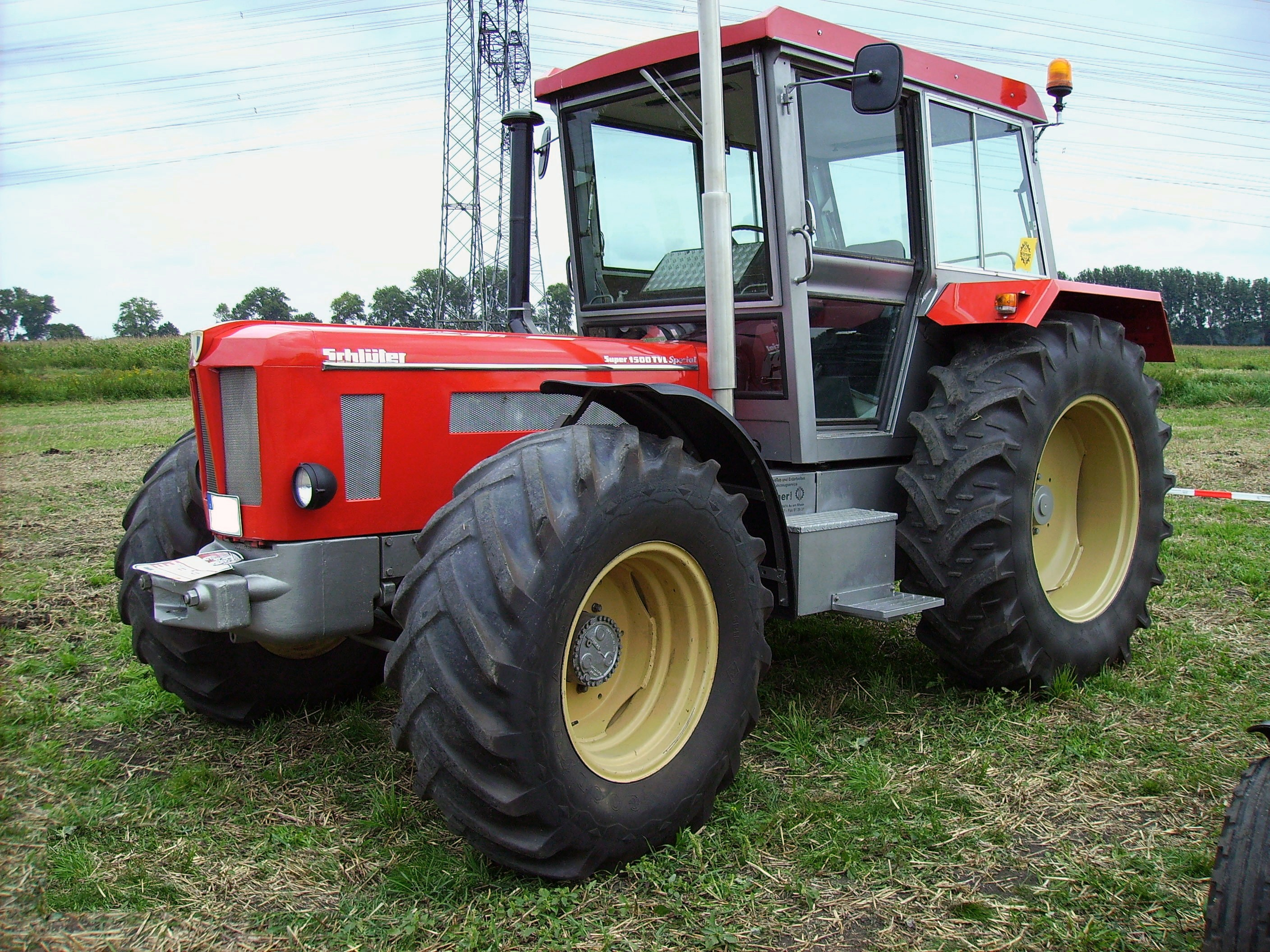 Schlüter Super 1500 TVL Spezial